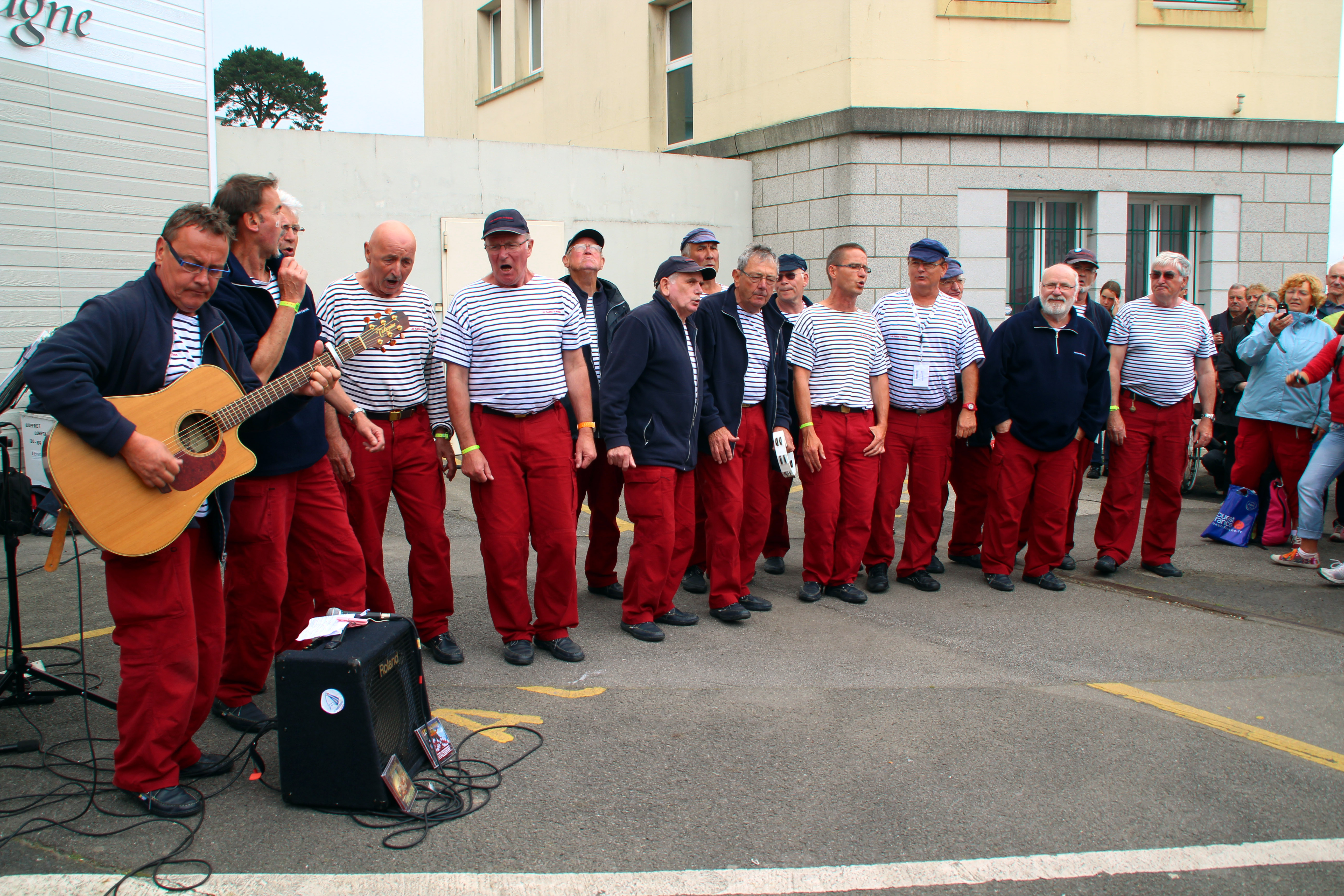 Tonnerres de Brest 2012 Les marins d'iroise